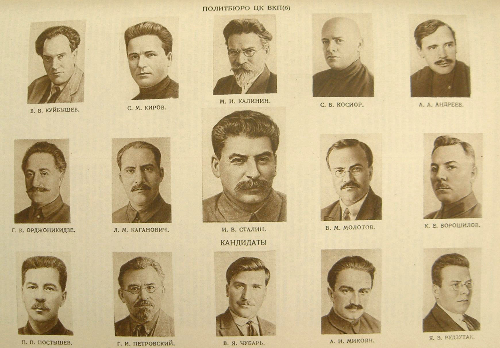 Политбюро ЦК ВКП(б)